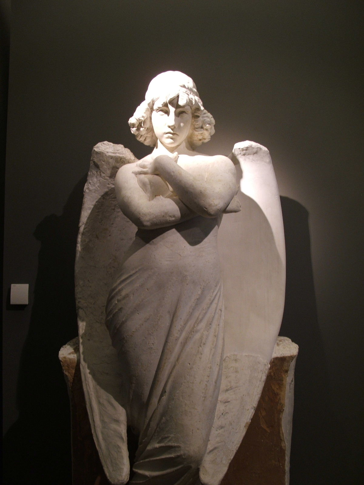 Genova - Parchi di Nervi - Modello dell'angelo di Giulio Monteverde oggi al Cimitero di Staglieno. Serie immagini GAM-Galleria d'Arte Moderna